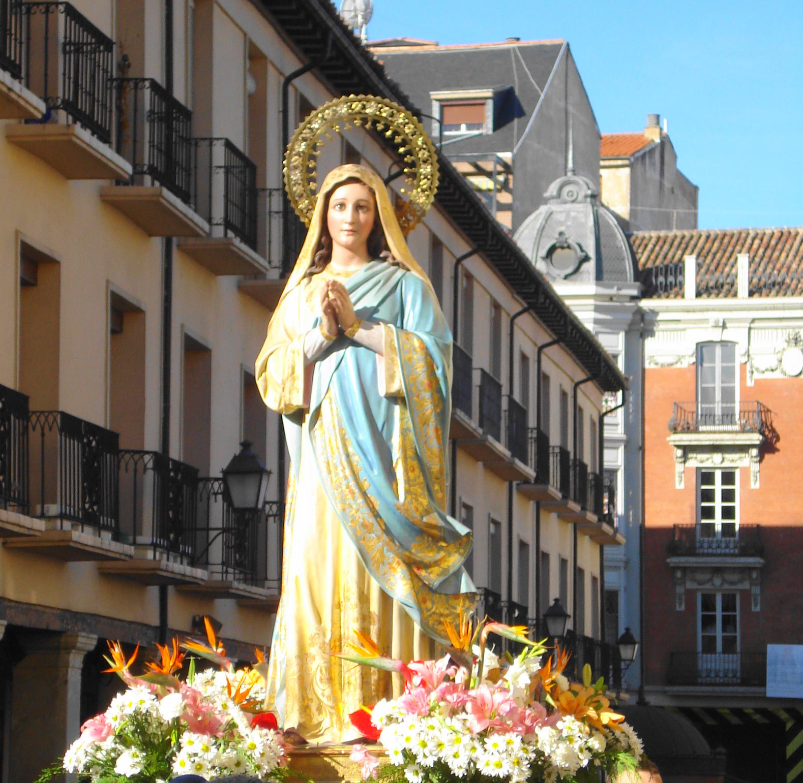 Virgen del Rompimiento